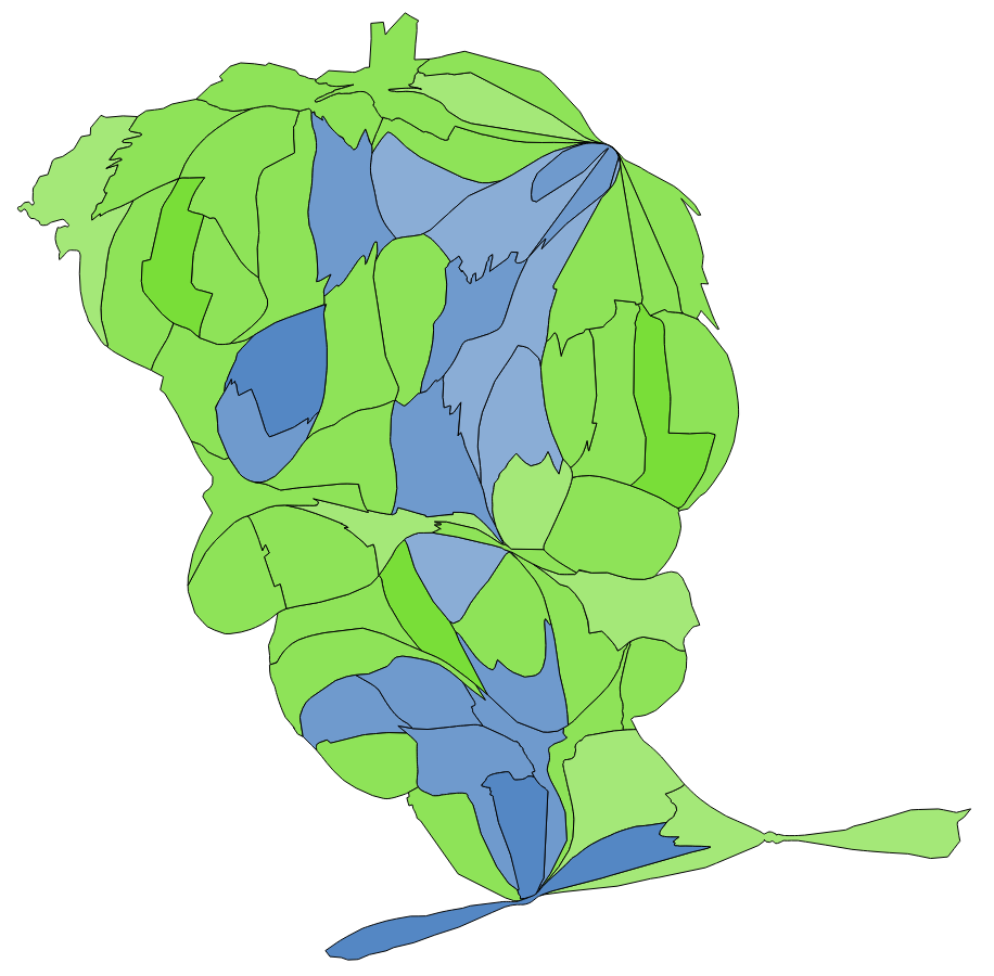 顏色對照表